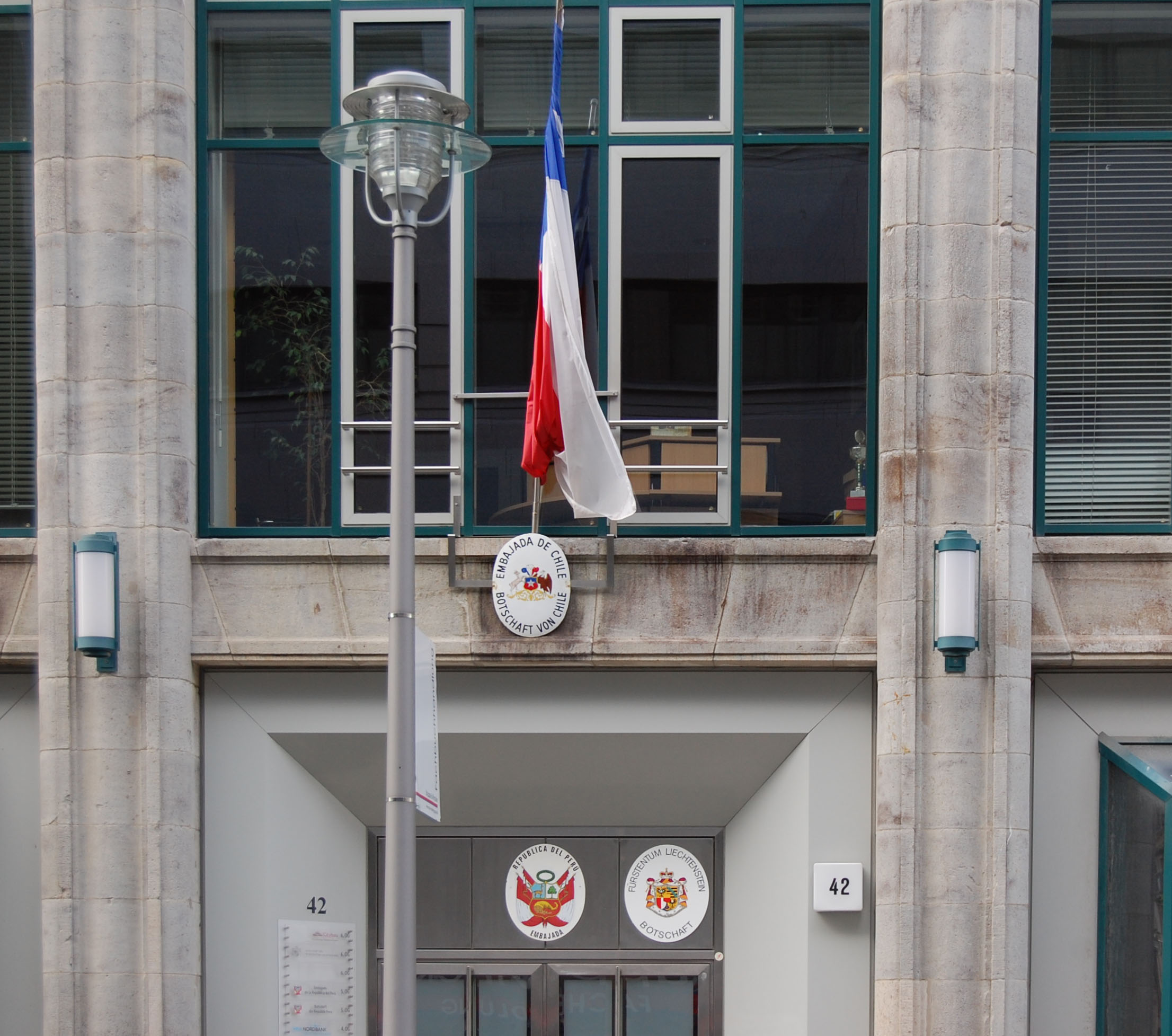 Embassies of Chile, Peru and Liechtenstein in Berlin